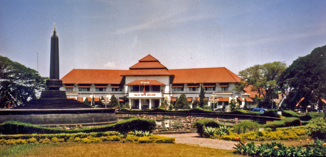 Malang Town Hall (Balai Kota Malang)